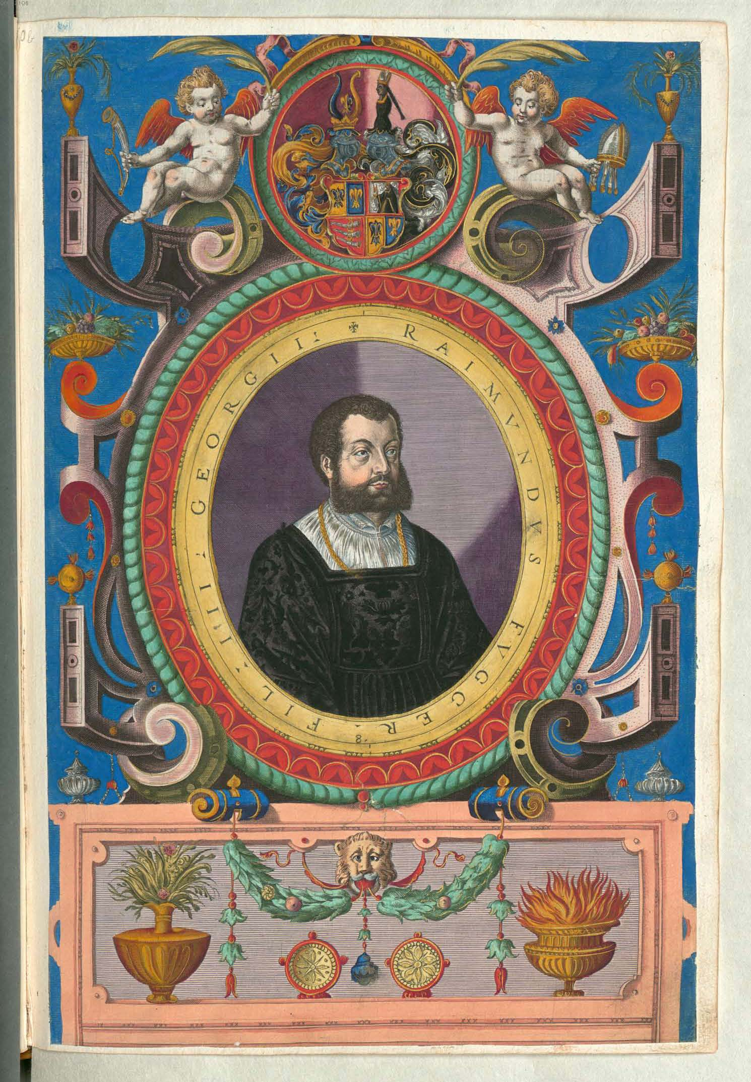 Fuggerorum et Fuggerarum imagines wurde 1588 von Philipp Eduard Fugger beim Kupferstecher Dominicus Custos in Auftrag gegeben. Das Werk enthält mit Aquarell- und Gouache-Farbe kolorierte Stiche der Mitglieder der Fugger von der Lilie. Der Druck von 1618 stellt das einzige kolorierte Exemplar dar. Raymund Fugger (1488-1535), Sohn Georg Fuggers (1453-1506)